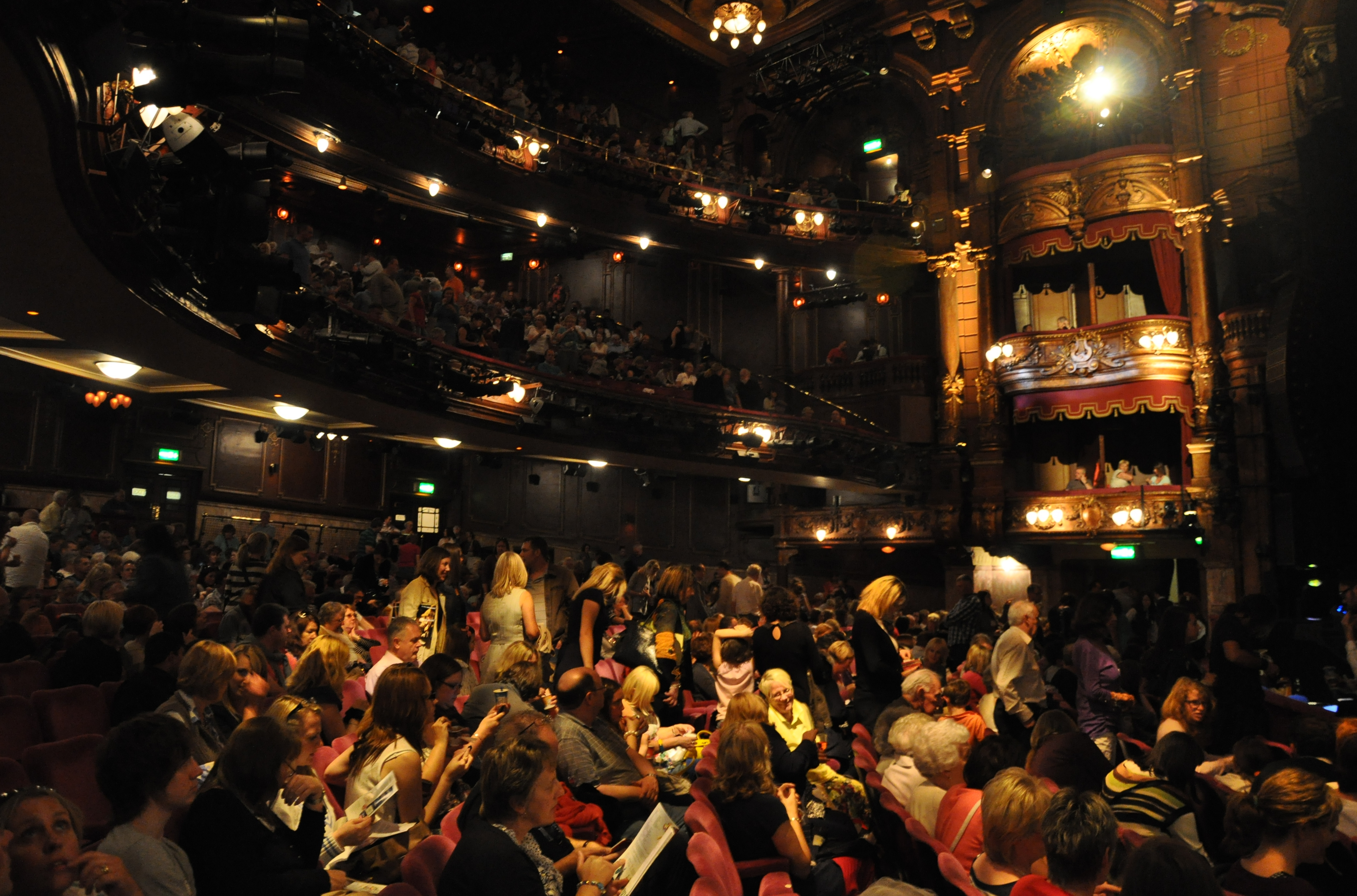 London, London Palladium, auditorium